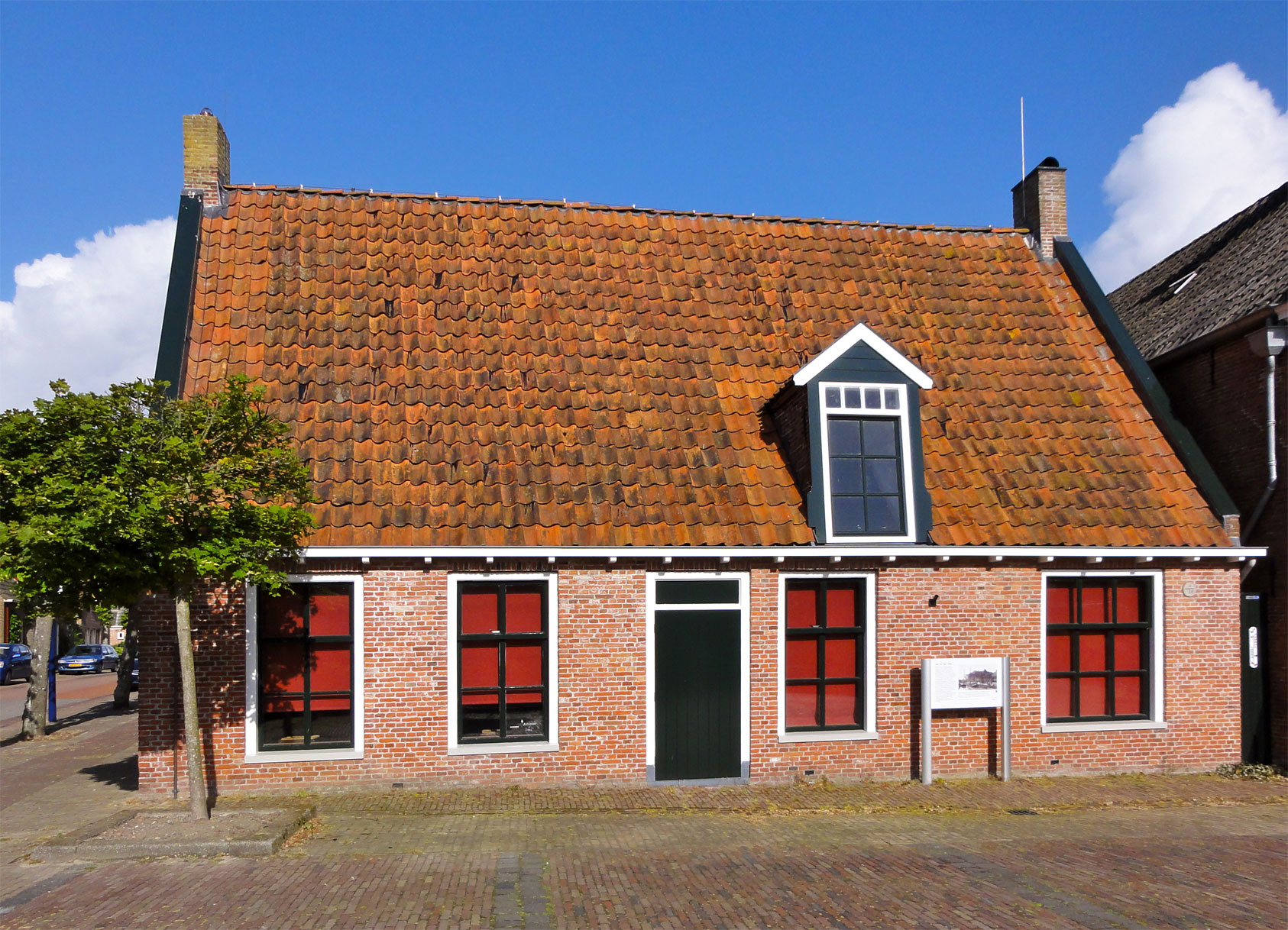 Hoofdstraat 1 in Blija